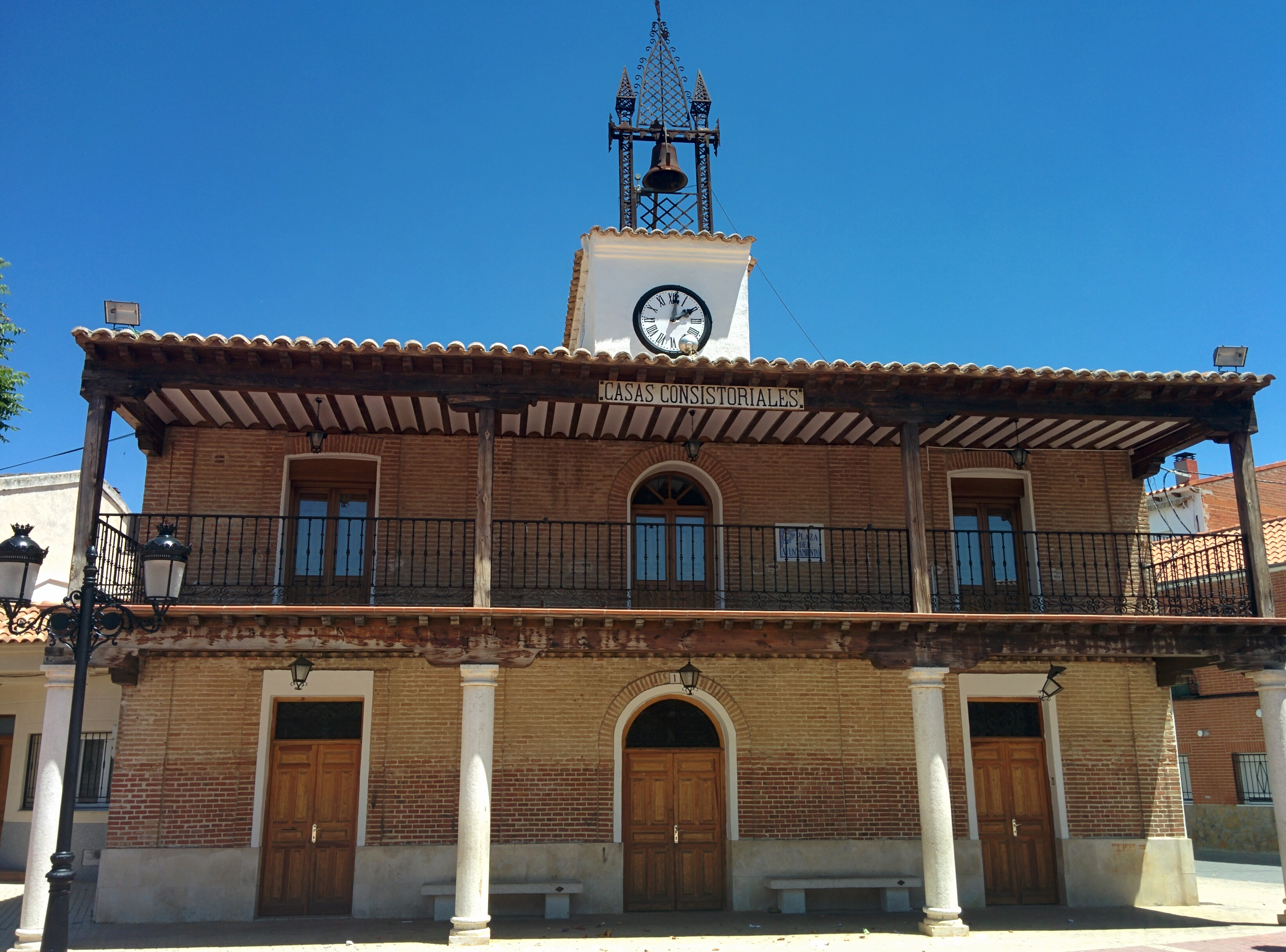 Casa consistorial de Numancia de la Sagra (Toledo, España).